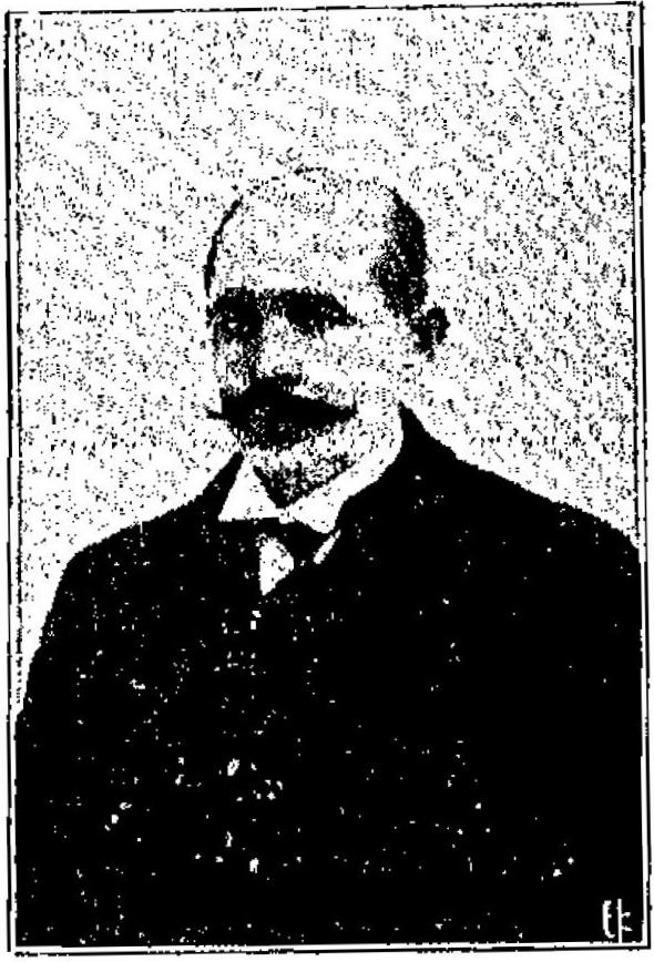 griechischer Politiker, 20. Jahrhundert